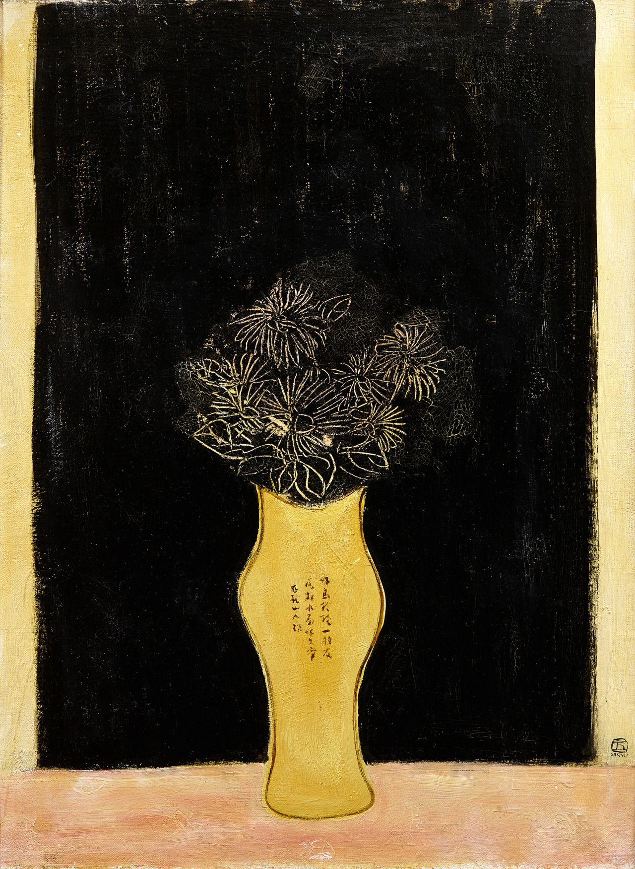 常玉的《題字瓶與白菊》